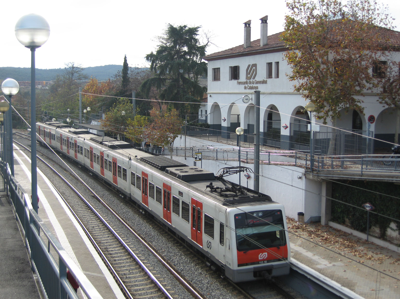 Estación de Sant Quirze del Valles de los Ferrocarriles de la Generalidad de Cataluña.